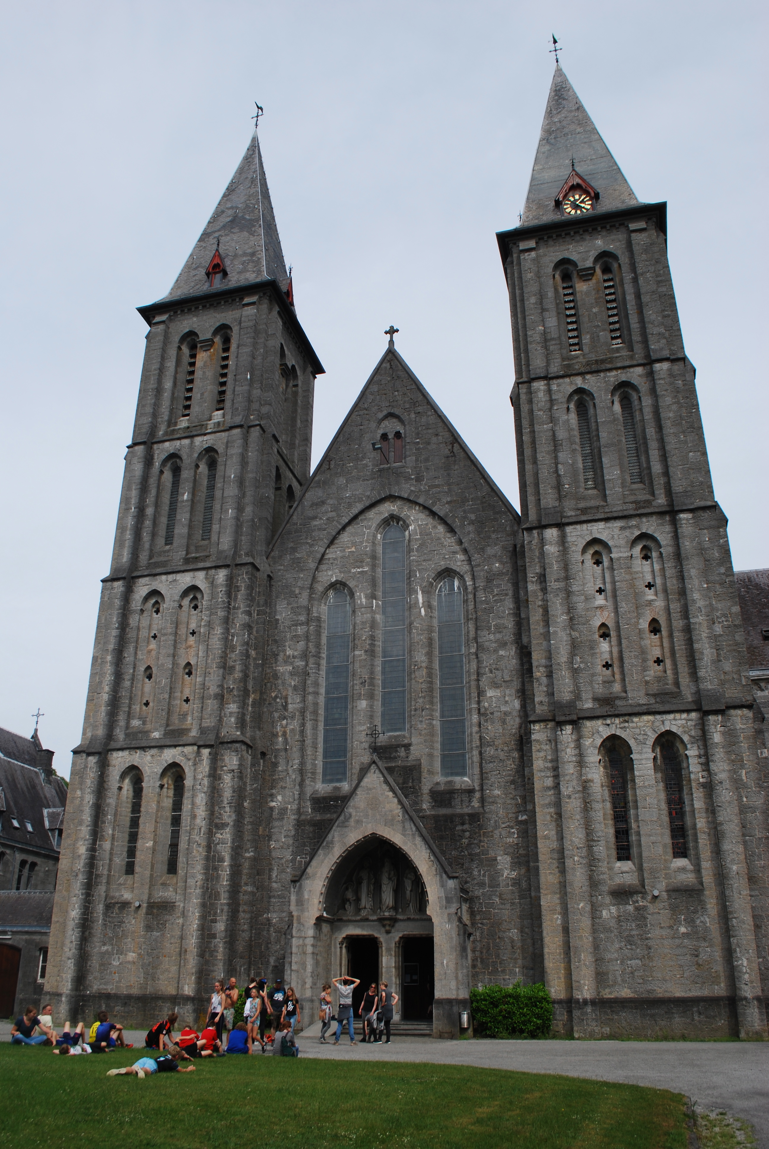 Vue de l'abbaye bénédictine de Maredsous, en Belgique.